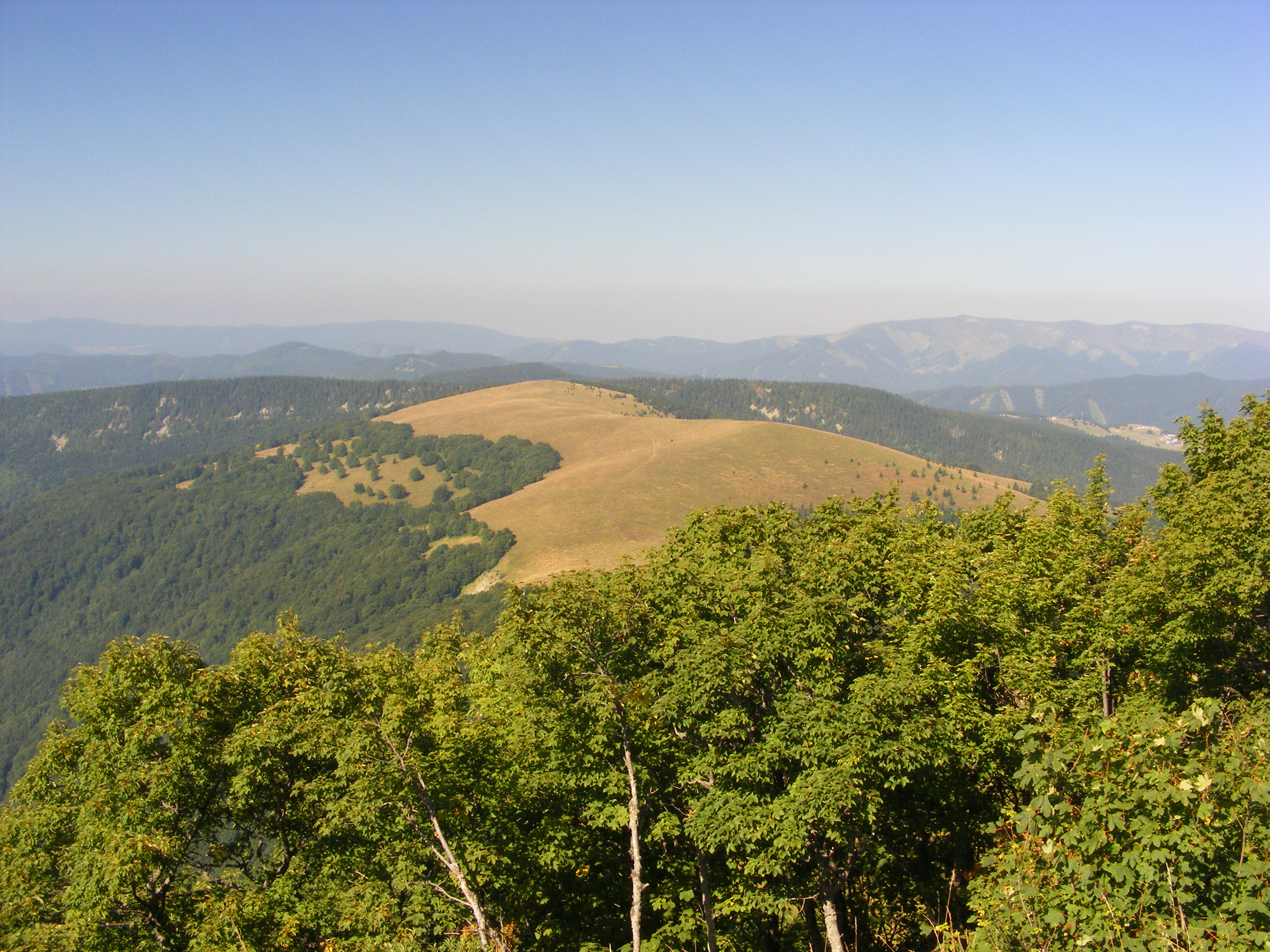 Nizke Tatry: Kečka & Hadliarka seen from Kozí Chrbát